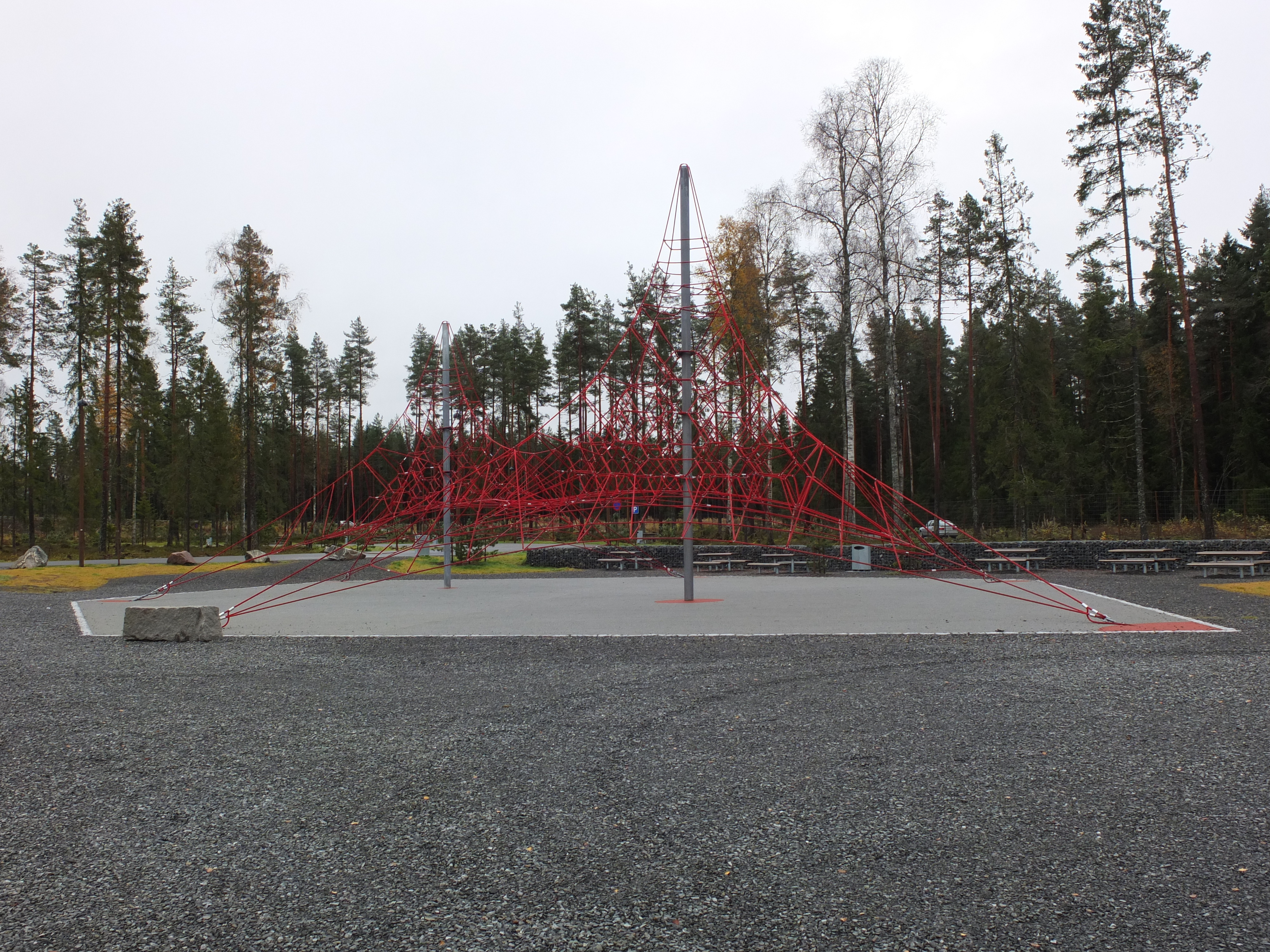 Lekestativ på rasteplassen på E6 ved Andelv